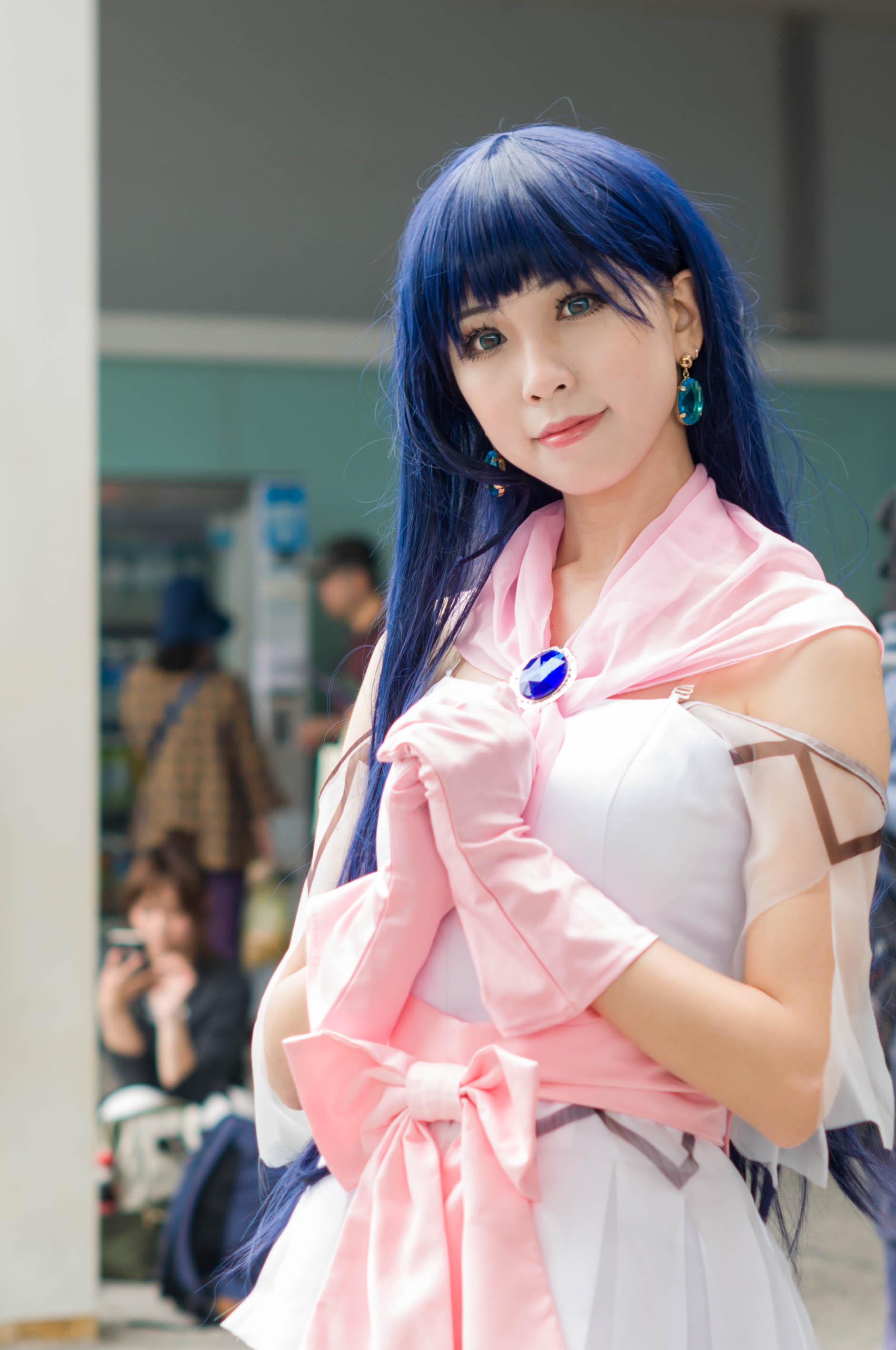 第26屆亞洲動漫創作展，《超時空要塞》林明美cosplayer。